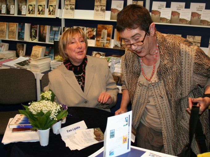 Ewa Lipska, Polish poet